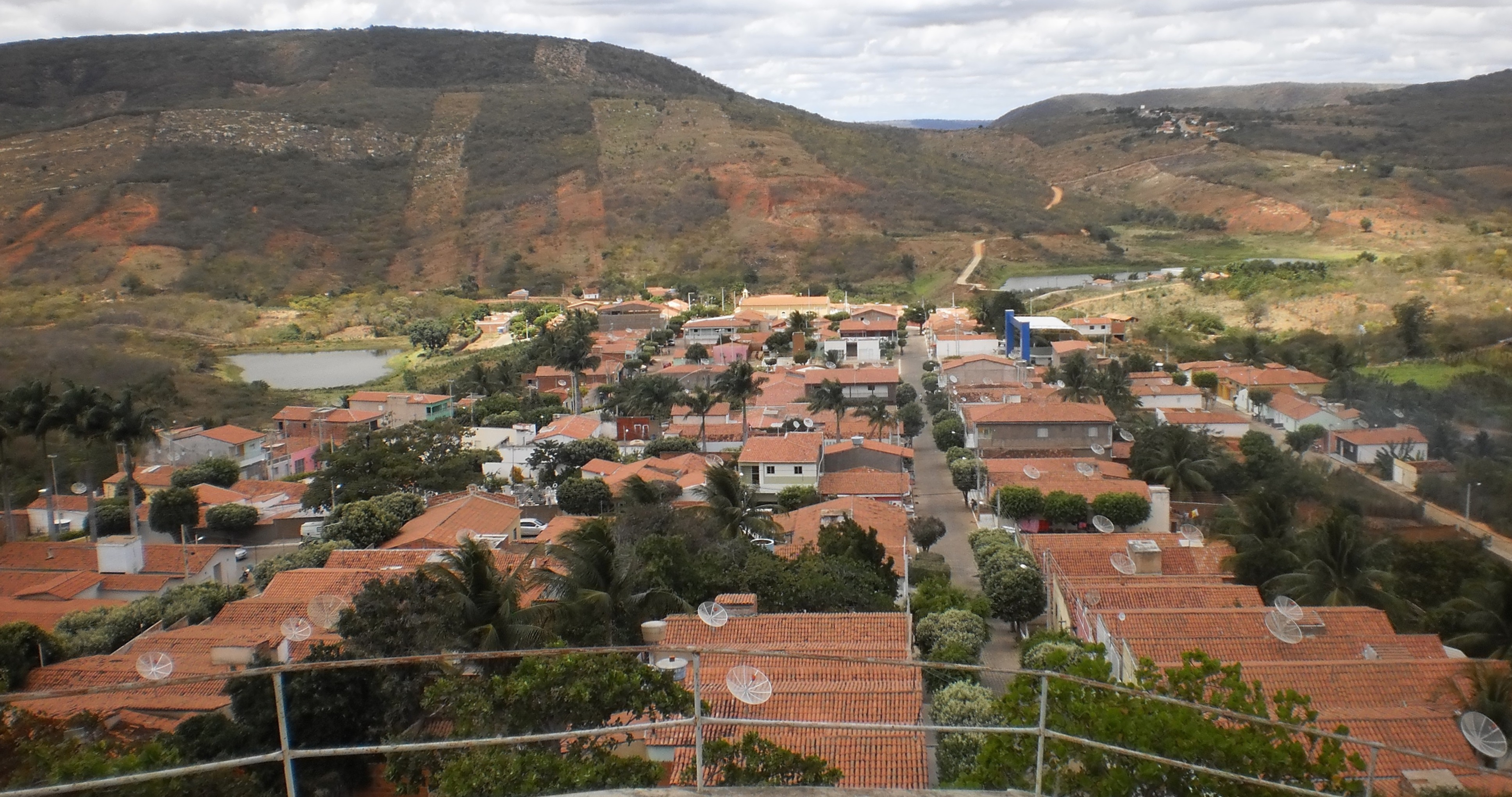 Vista panorâmica de Venha-Ver a partir da Estátua de Frei Damião - Rio Grande do Norte, Brasil.